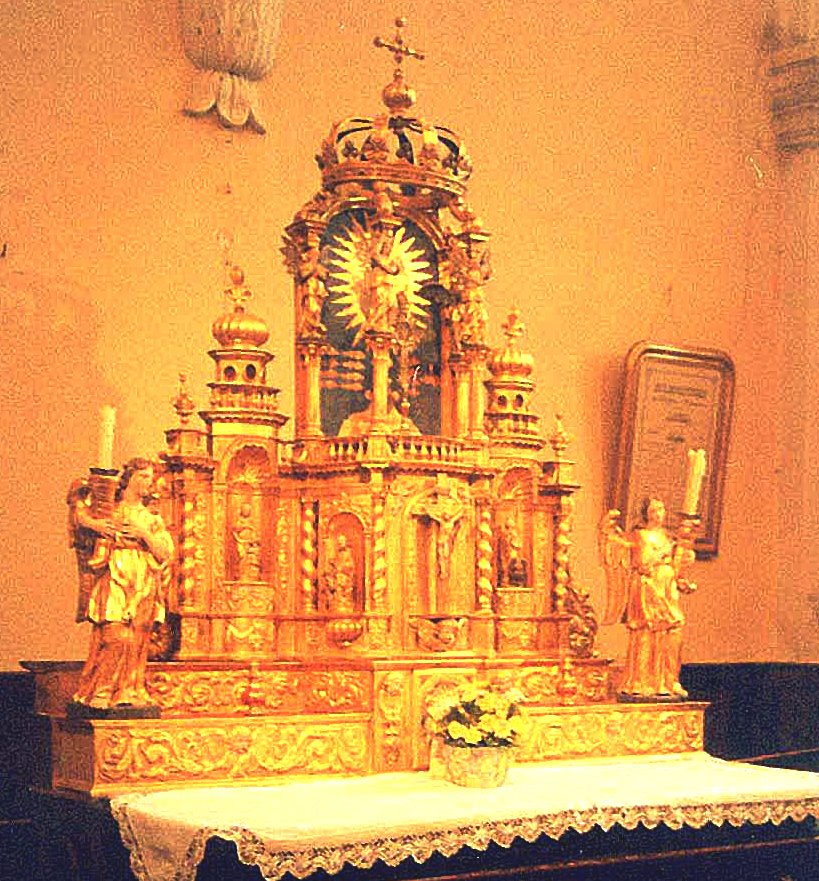 Savas église retable autel principal